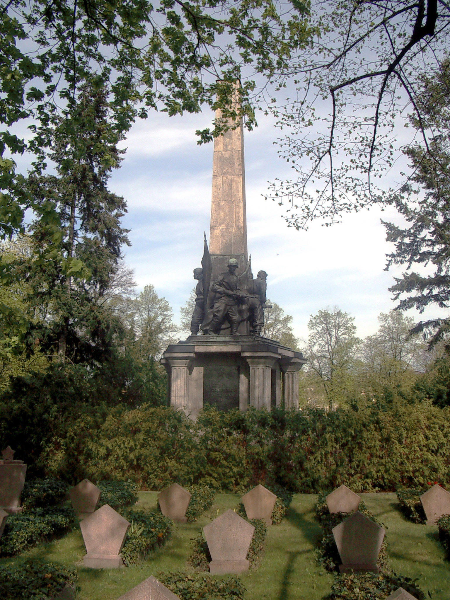 Der sowjetische Ehrenfriedhof mit einem Obelisken in Potsdam in der Mitte des Bassinplatzes (Sowjet graveyard at Potsdam, Germany)